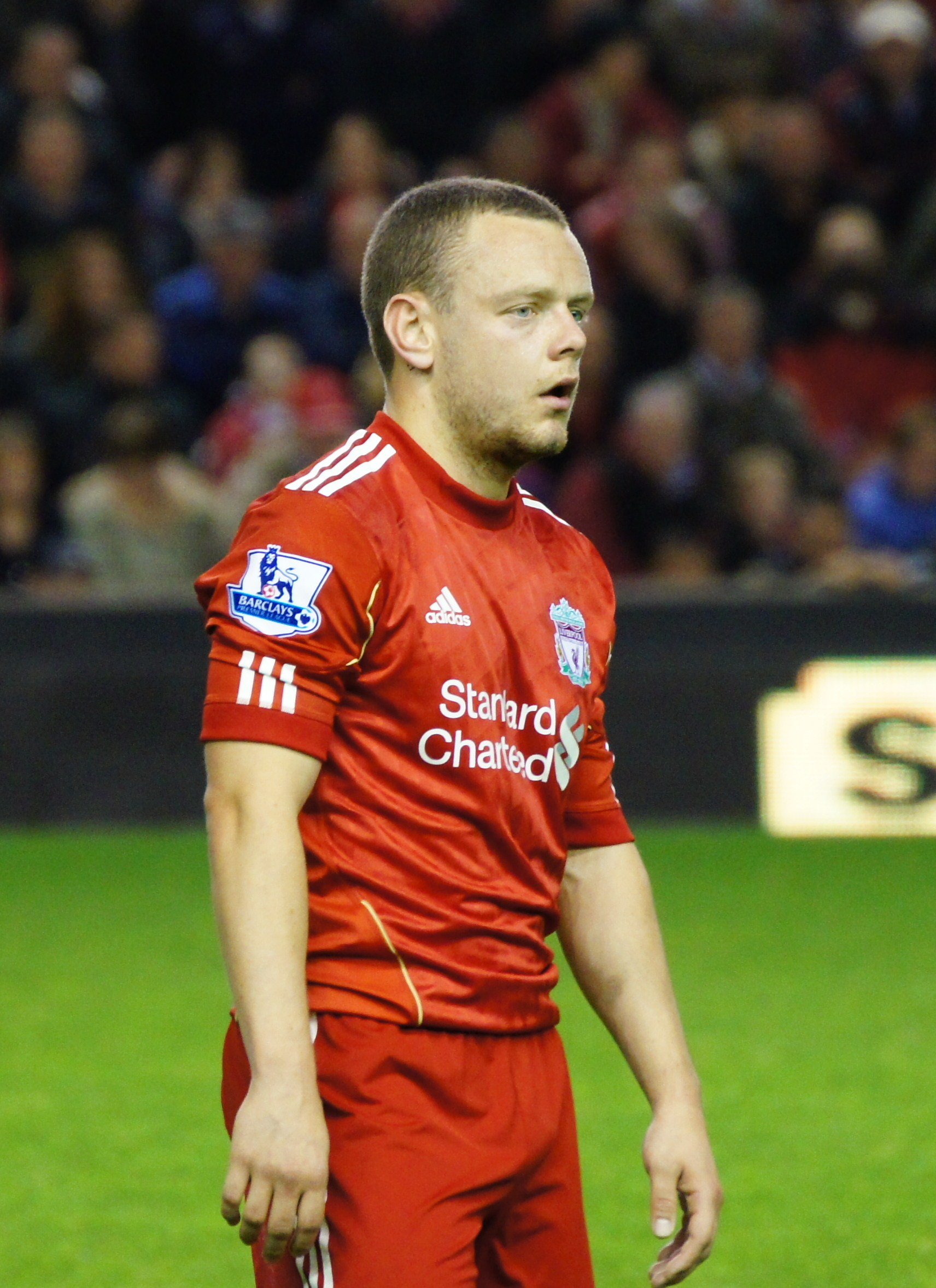 Jay Spearing against Fulham, 01/05/2012.